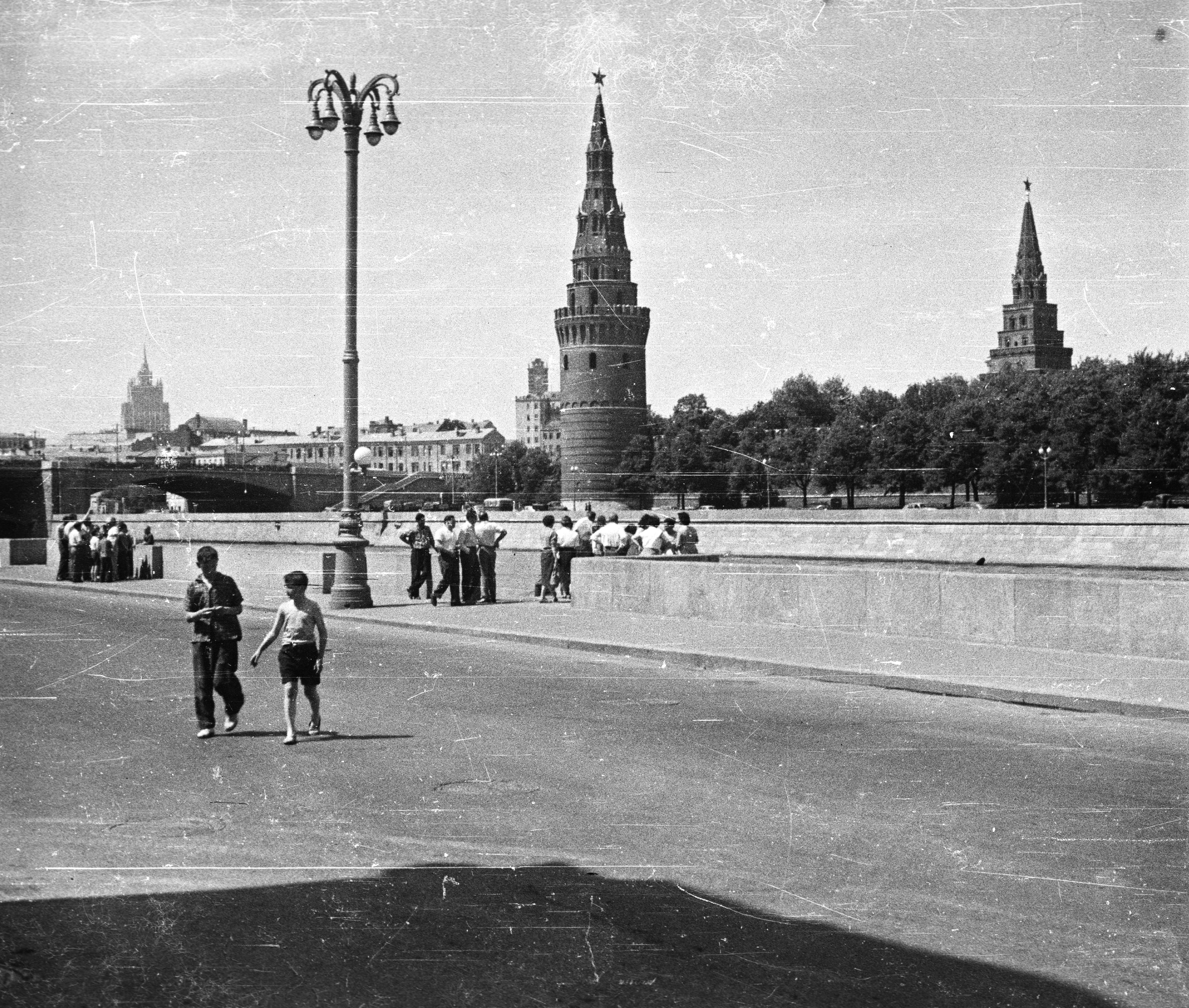 Szofijszkaja rakpart, balra a Moszkva folyón átívelő Bolsoj Kamennij híd. Jobbra a Kreml tornyai, a Vodovzvodnaja és a Borovickaja. Location: Russia, Moscow Tags: Soviet Union Title: Szofijszkaja rakpart, balra a Moszkva folyón átívelő Bolsoj Kamennij híd. Jobbra a Kreml tornyai, a Vodovzvodnaja és a Borovickaja.